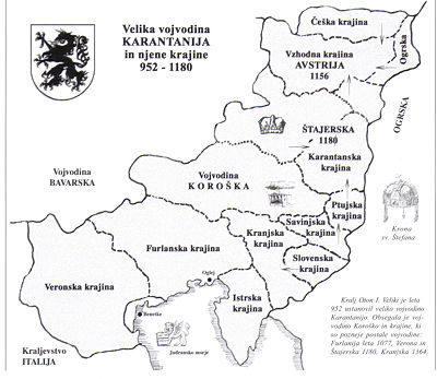 Great Carantania